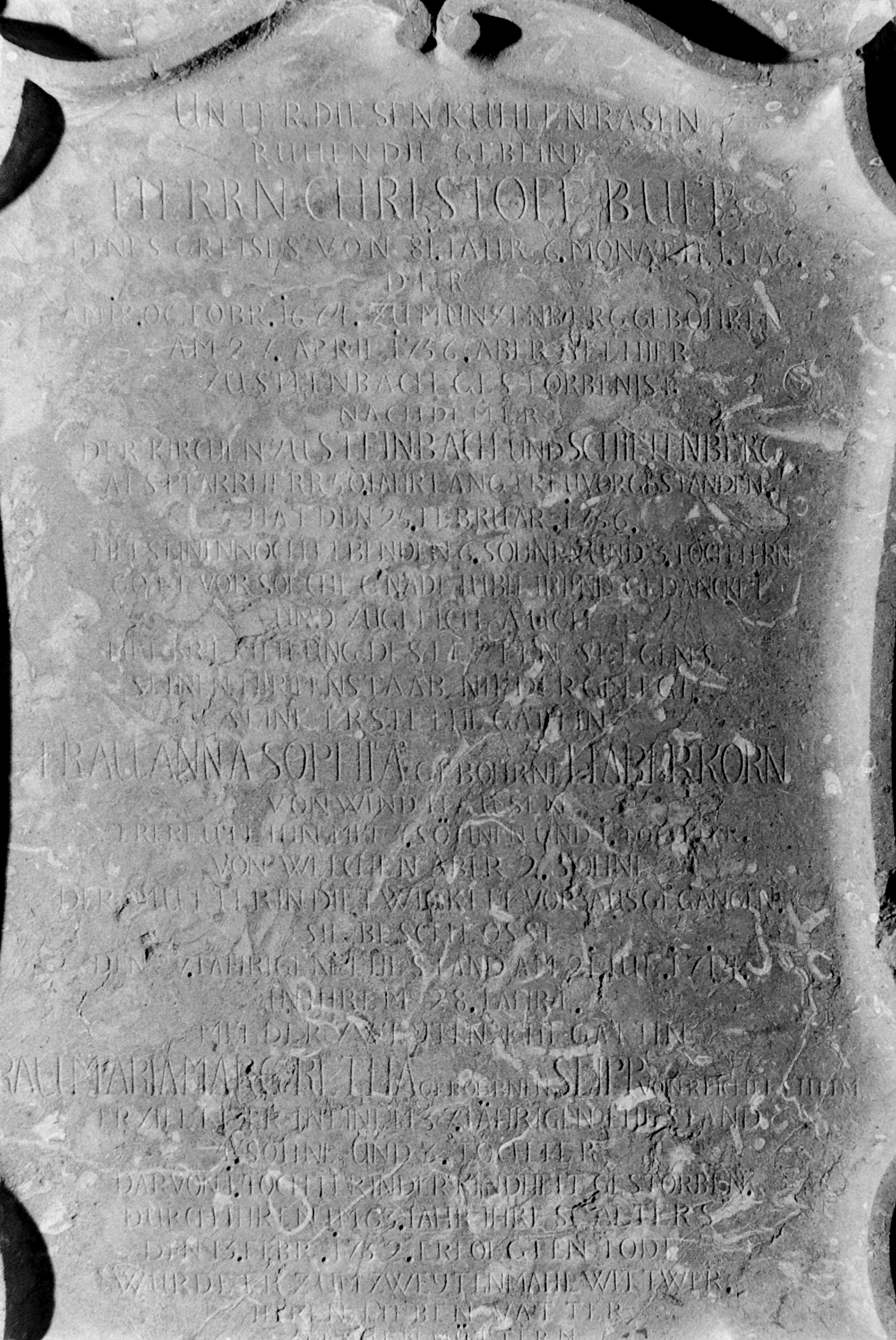 Grabmal von Pfarrer Johann Christoph Buff in der Kirche in Steinbach, Fernwald, Hessen